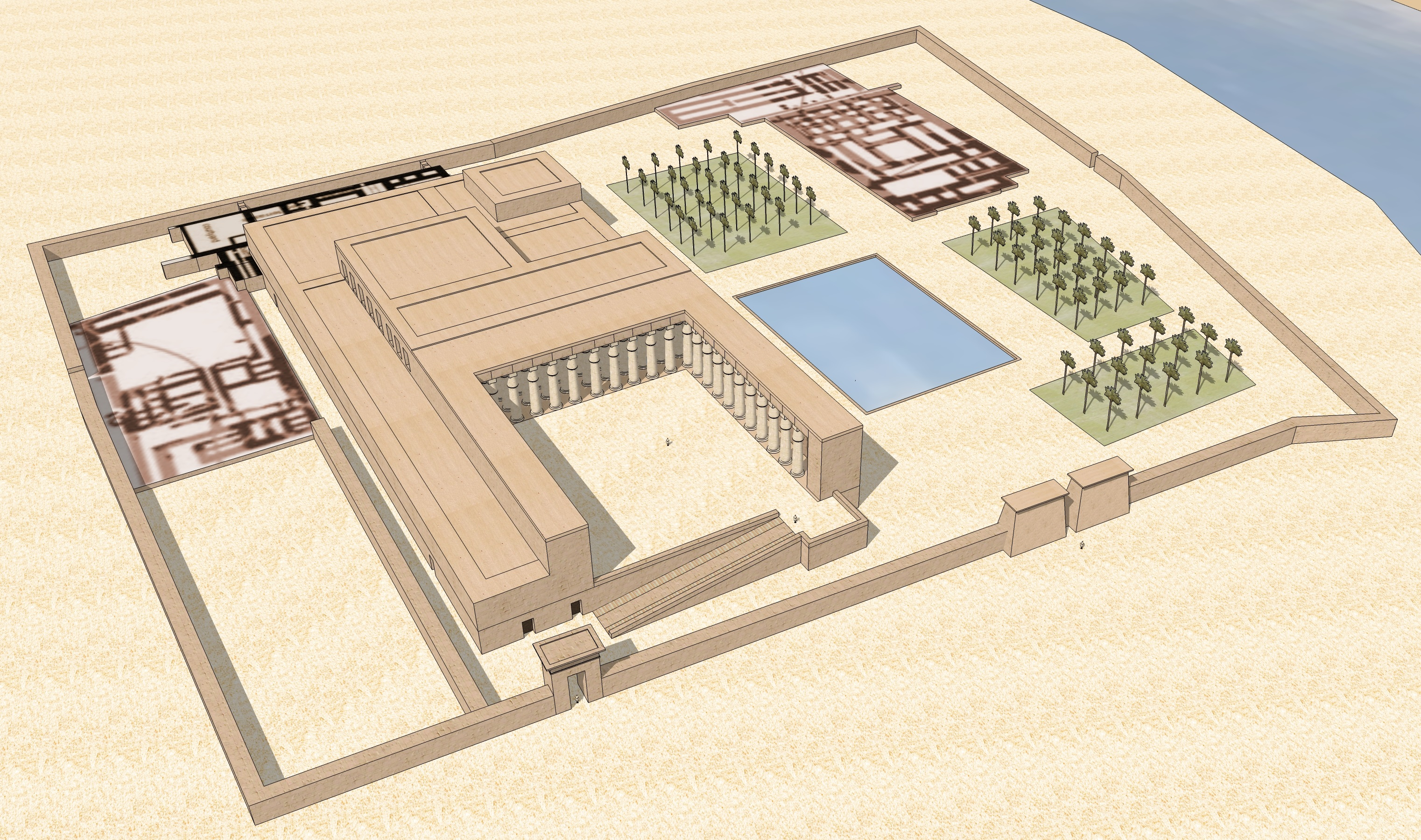 Proposition de restitution du Palais G d'Avaris